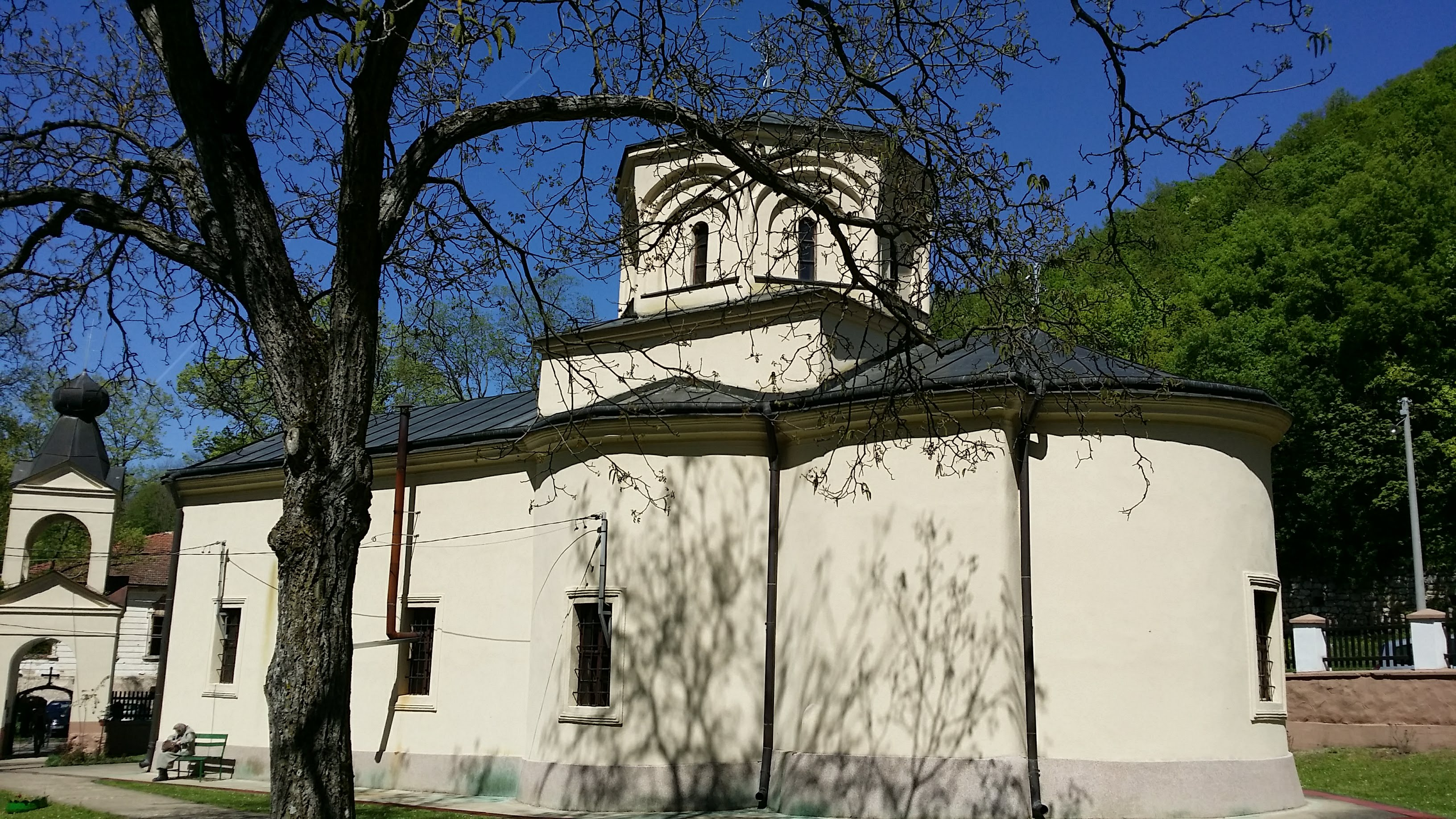 Црква